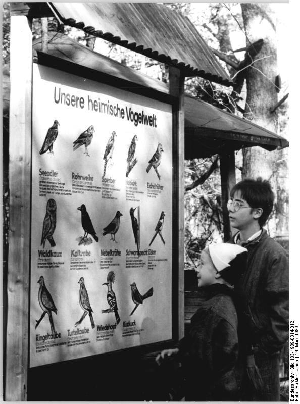 Mukran, Hinweistafel im Naturschutzgebiet ADN-ZB Häßler 14.3.1989-he Bez. Rostock: Naturschutzgebiet – Anziehungspunkt für viele Besucher und Urlauber ist die in Europa einmalige Küstenbildung im Naturschutzgebiet Schmale Heide bei Mukran – Kreis Rügen. Schautafeln erläutern hier die seltene Tier- und Pflanzenwelt. Siehe auch 1989-0314-13N. Durch eine Sturmflut vor 3500-4000 Jahren wurden die Stein-Felder mit den 14 Geröllwällen aufgeschüttet. Da diese Fläche zu 90 Prozent aus Feuerstein und nur zu 10 Prozent aus kristallinem Gestein besteht, erhielt sie den Beinamen "Feuersteinfelder".